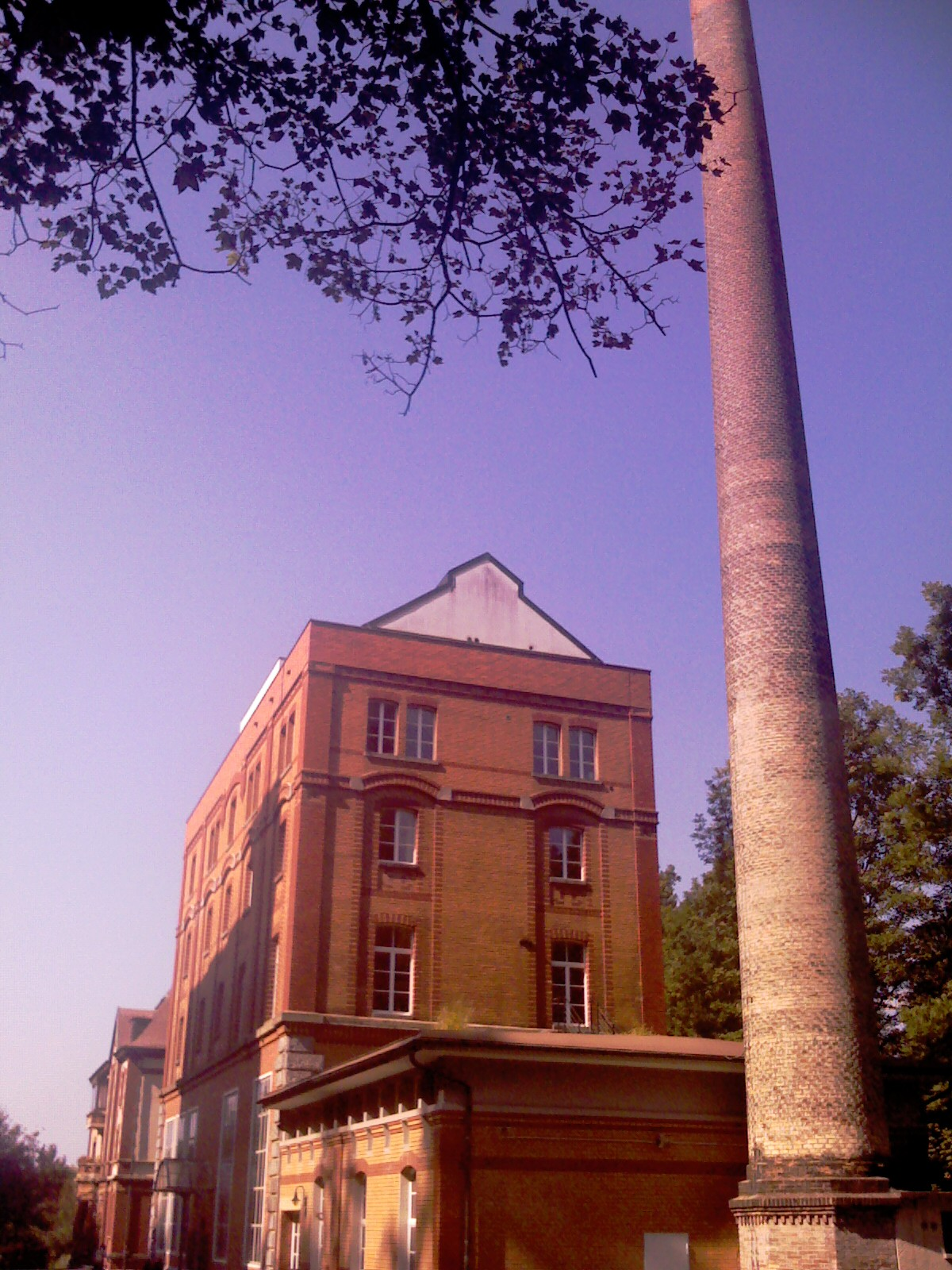 Beer Factory Uster at Ustermer Aa/Bierfabriko Uster apud Ustermer Aa, Bierbrauerei Uster am Ufer der Ustermer Aa